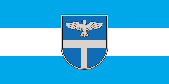 Līvānu novada karogs